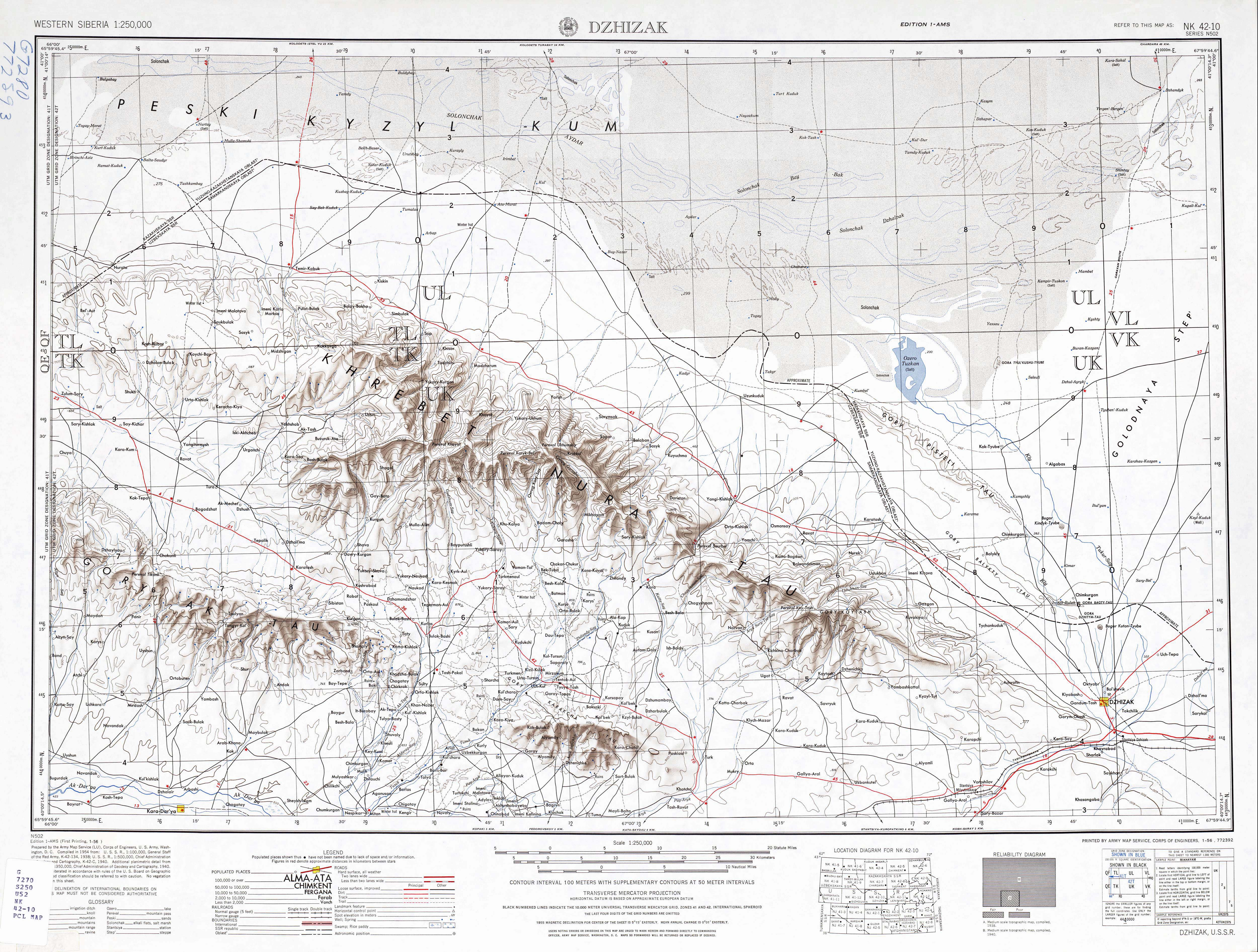 Nurataugebirge und Umgebung, ursprünglicher Tuzkansee